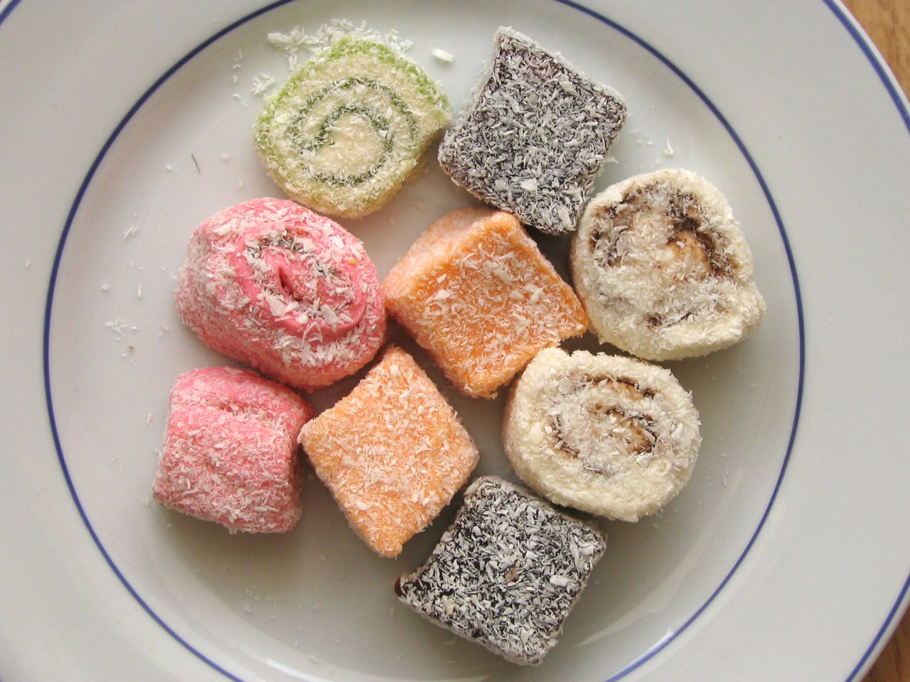 Türkischer Honig